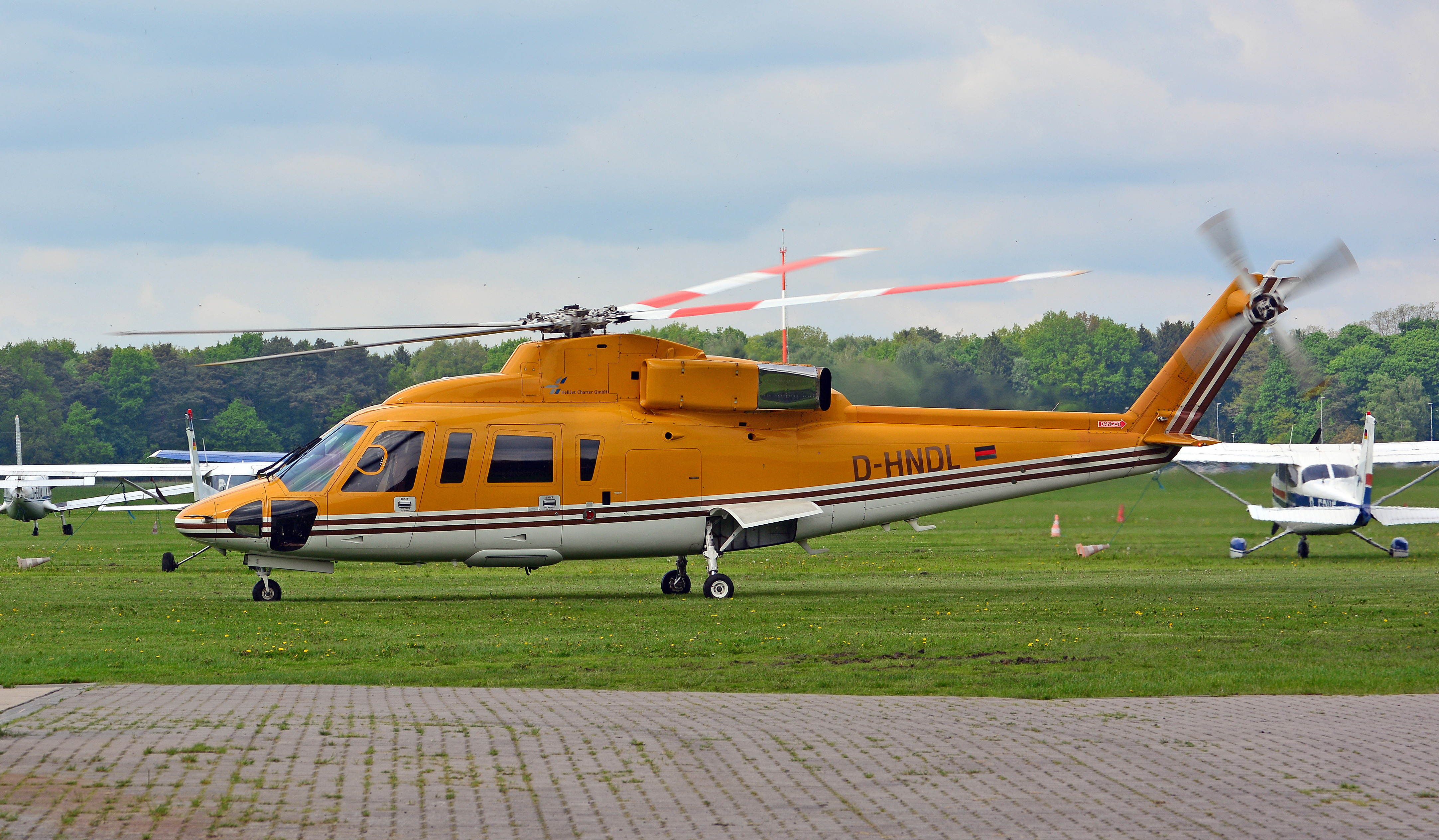 Sikorsky S-76B Spirit (D-HNDL) auf dem Flugplatz Uetersen